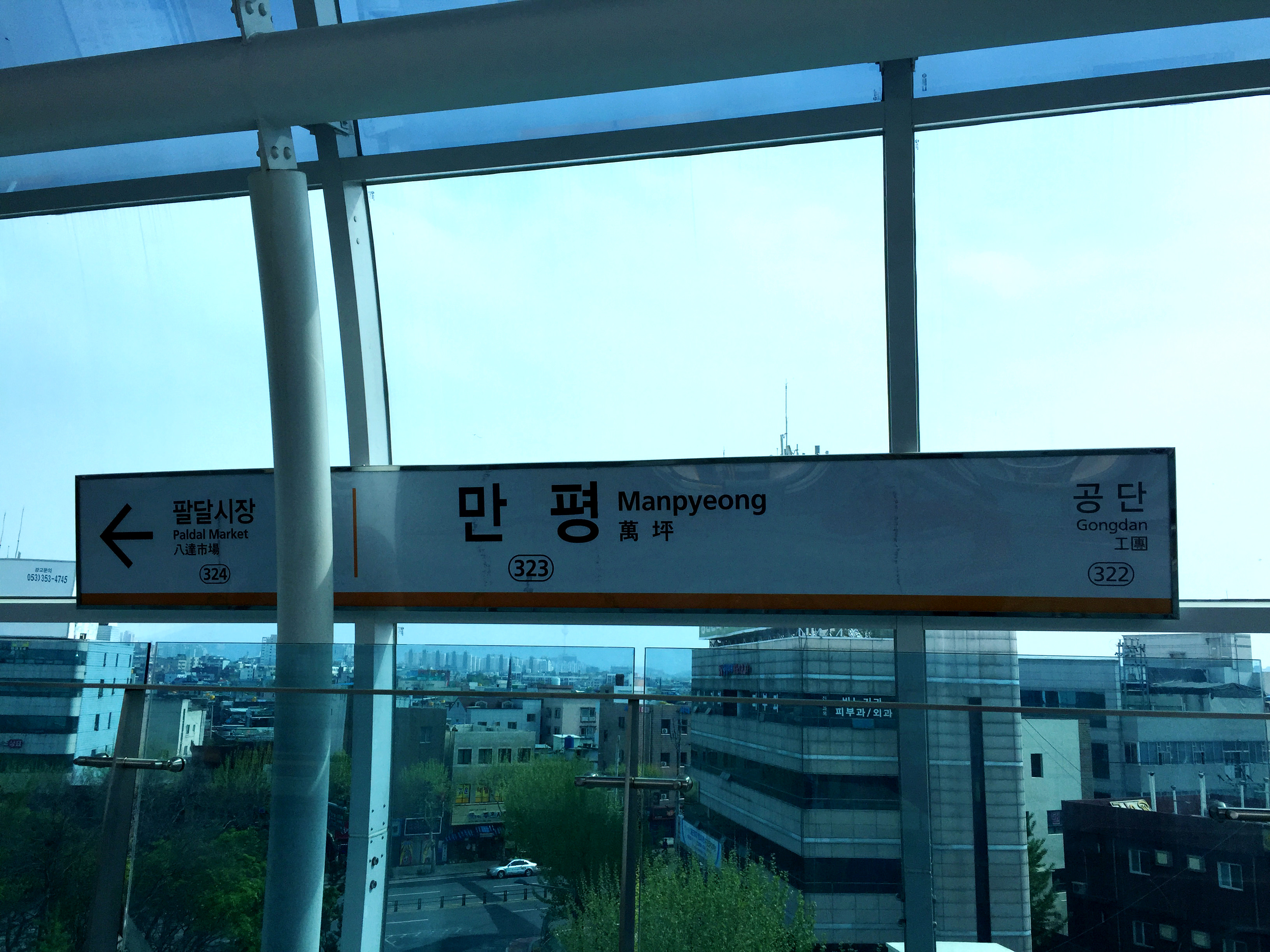 만평역 역명판